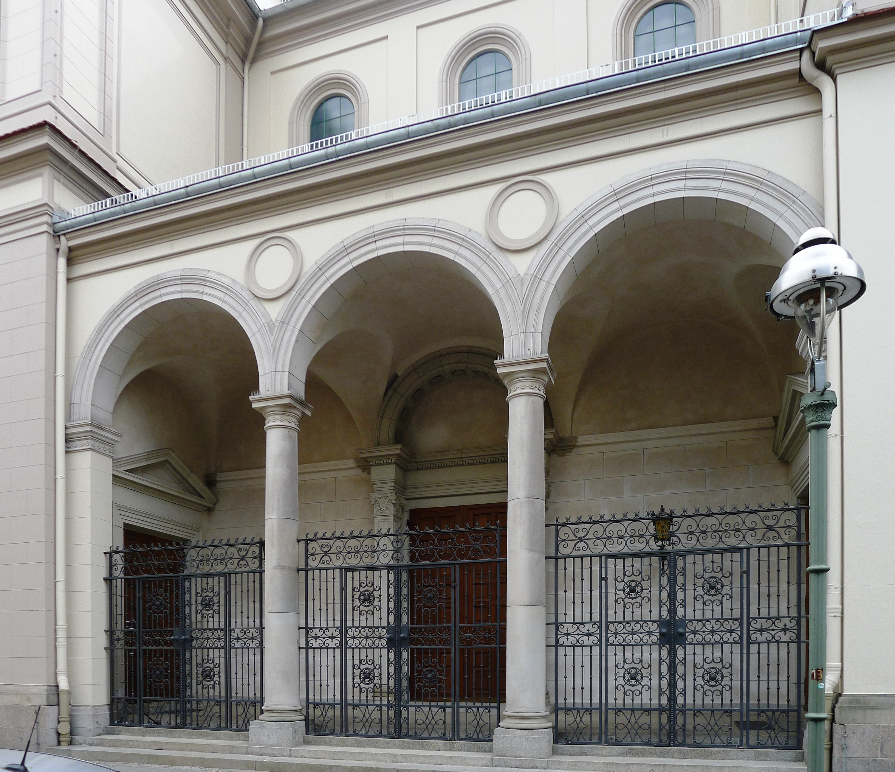 Arkade der offenen Vorhalle mit den Eingängen zur Kirche